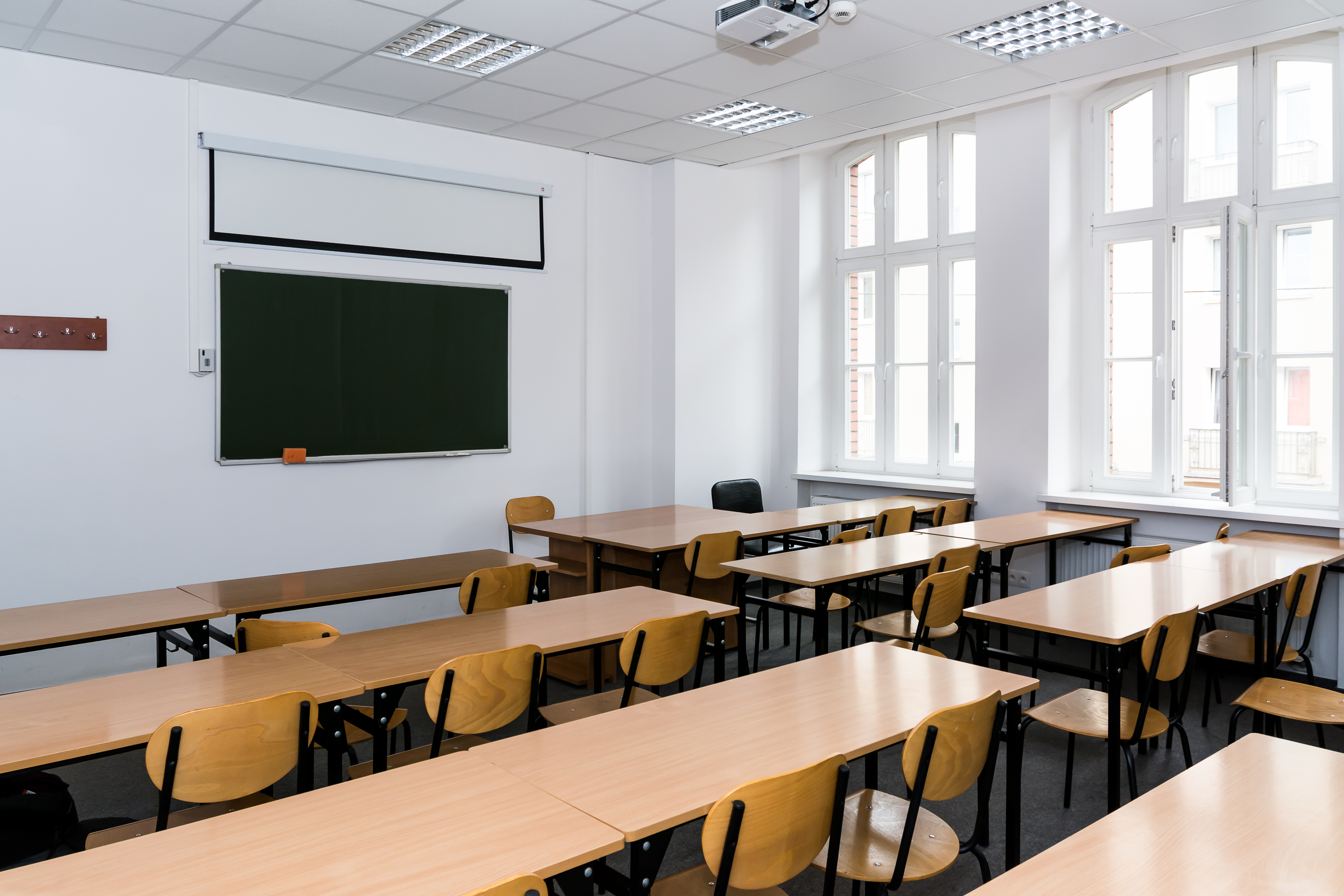 Strusia